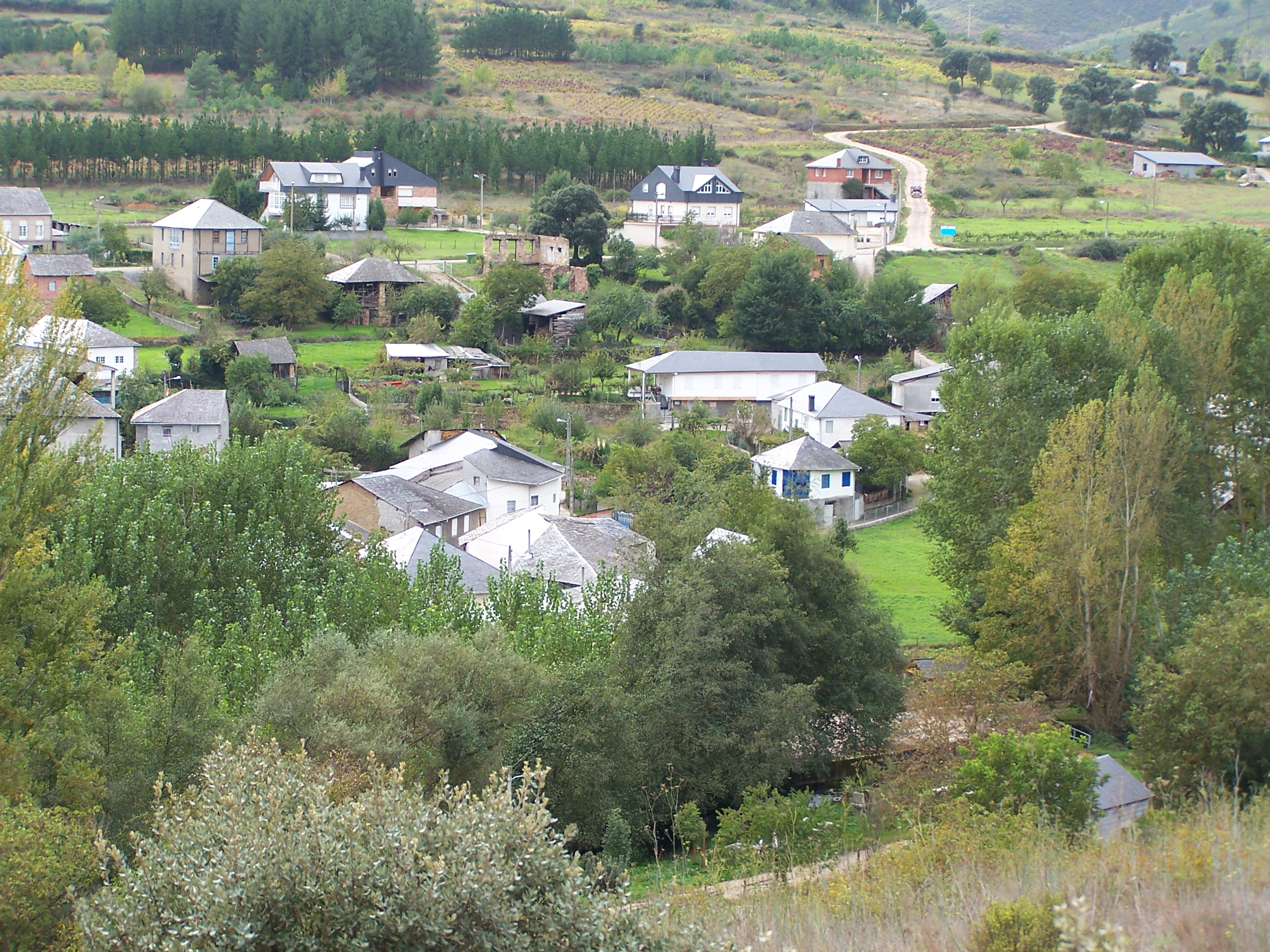 O Porto (Rubiana)